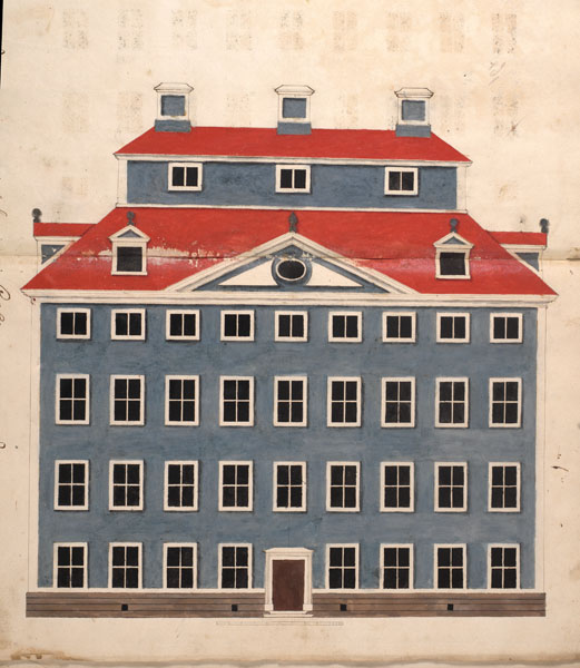 Jonas Nilsson Fristedt, Mästerstyckeritning nummer 32 i Murmestare Embetet i Stockholm, från 1695. Jonas Nilsson Fristedt var slottsmurmästare och ålderman.